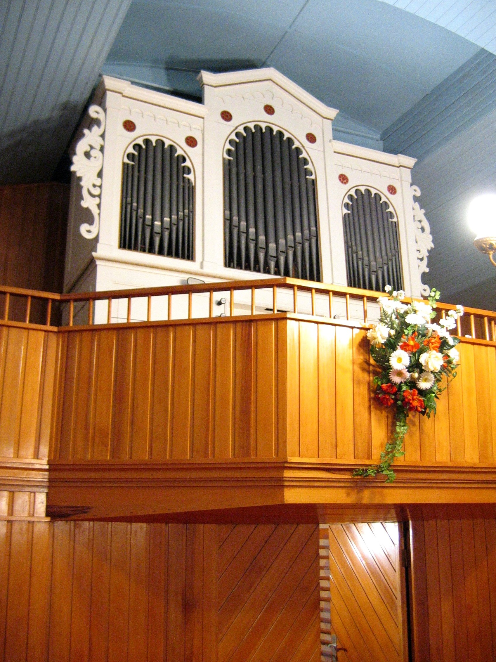 Orgel in Rorichum, Landkreis Leer